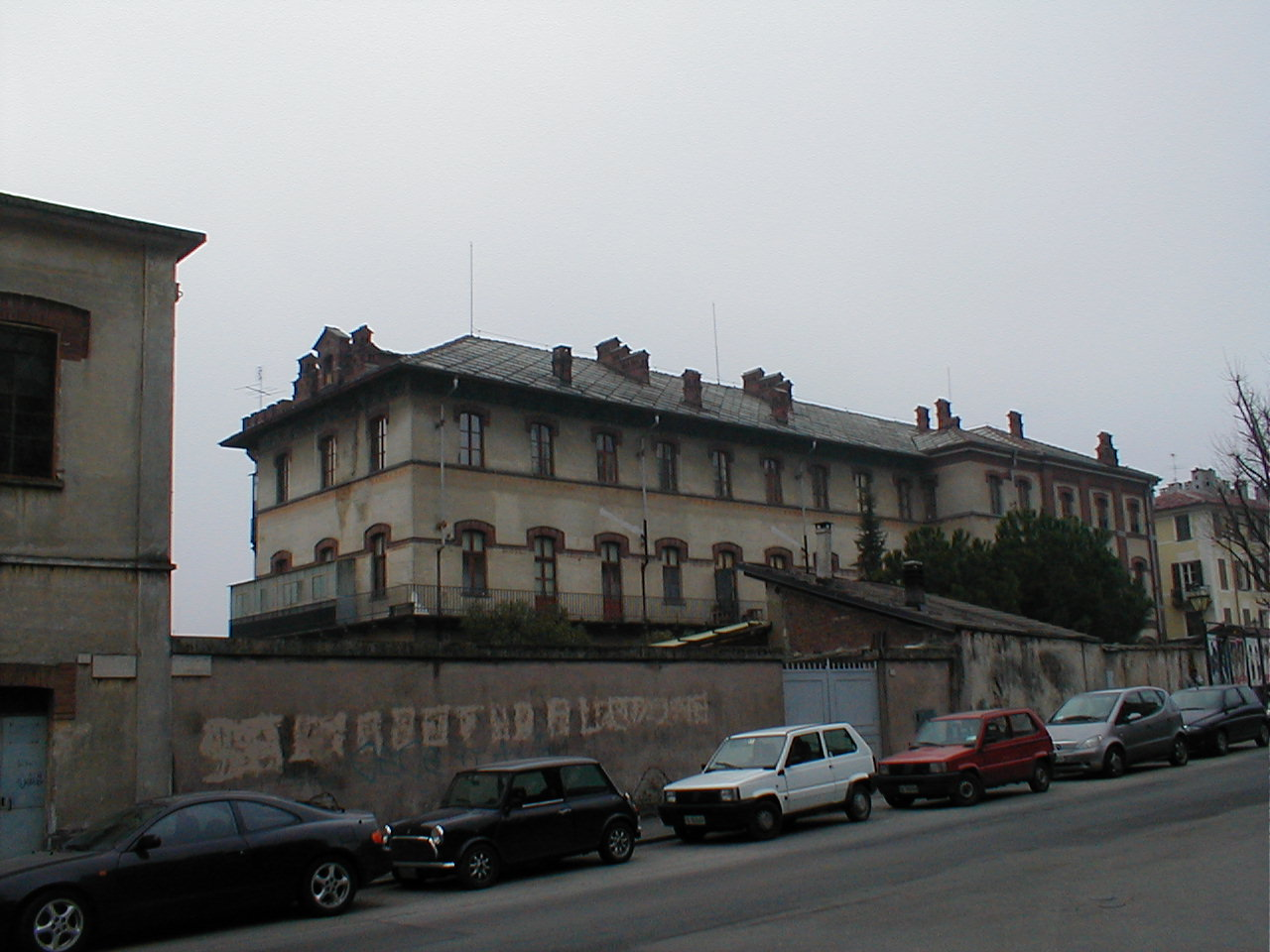 Propsetto laterale